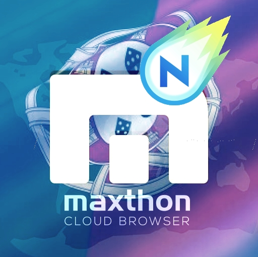 O ícone português do Maxthon